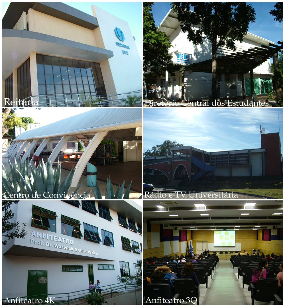 Espaços Físicos - UFU